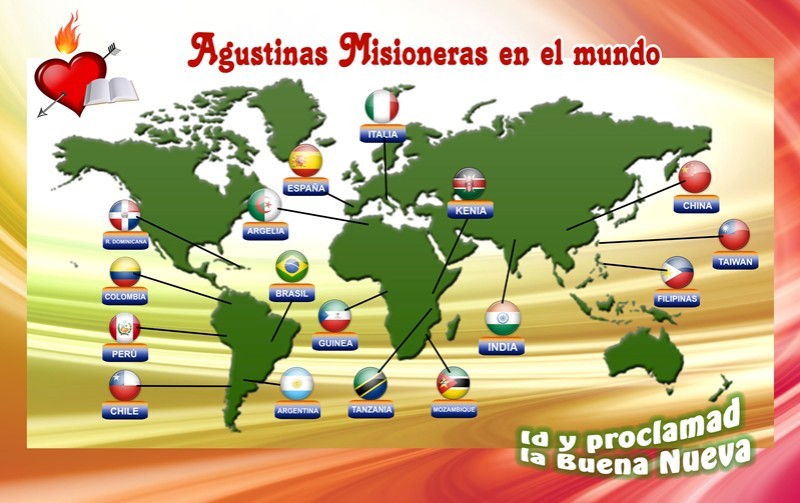 Las Religiosas Agustinas Misioneras estamos en 17 países intentando llevar el mensaje de Amor que Jesucristo nos ha regalado gratuitamente.